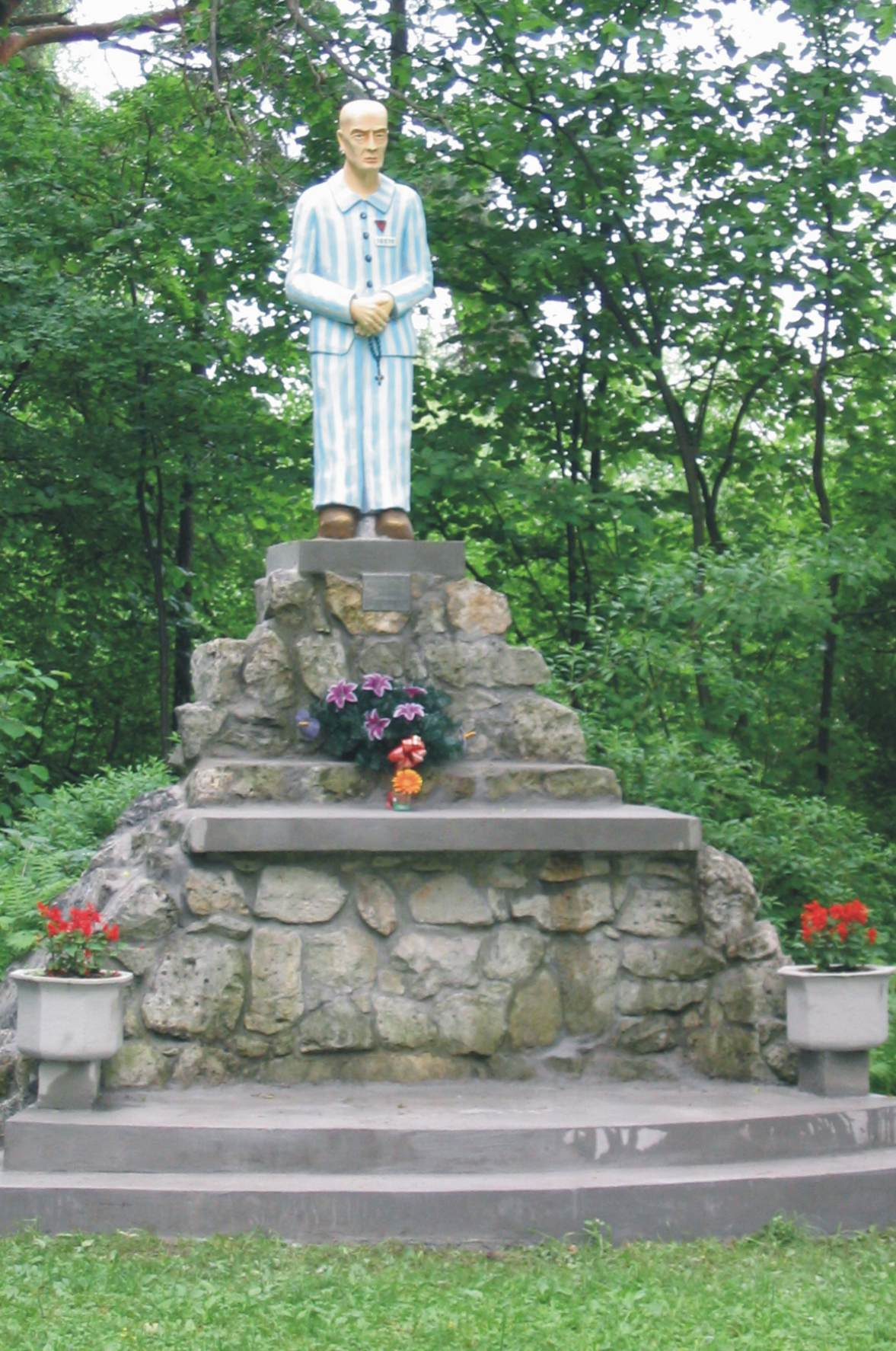 Pomnik św. Maksymiliana Kolbe przy kościele MB Ostrobramskiej w Chrzanowie